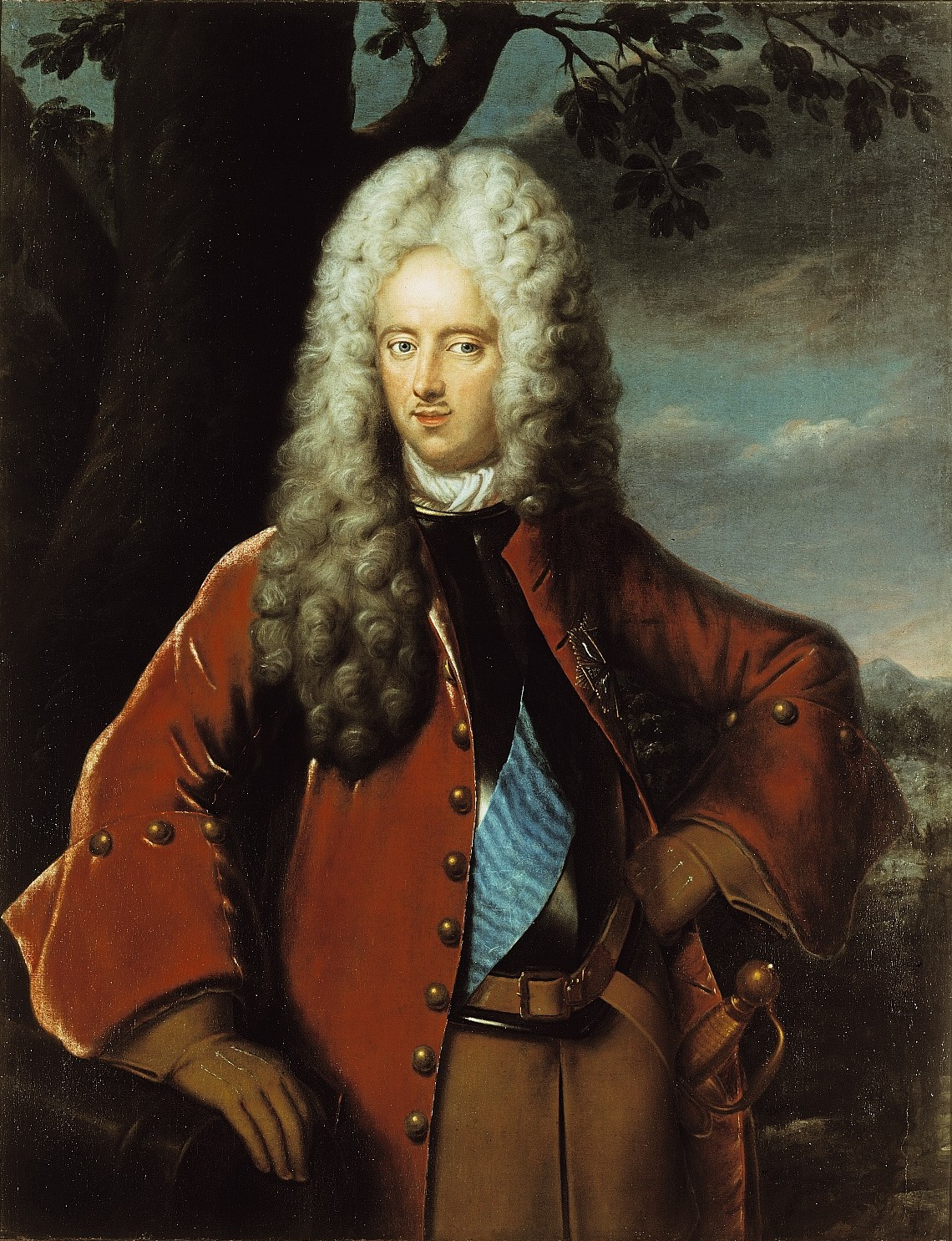 Joseph Anton Gabaleon von Wackerbarth-Salmour (1685–1761), sächsischer Minister